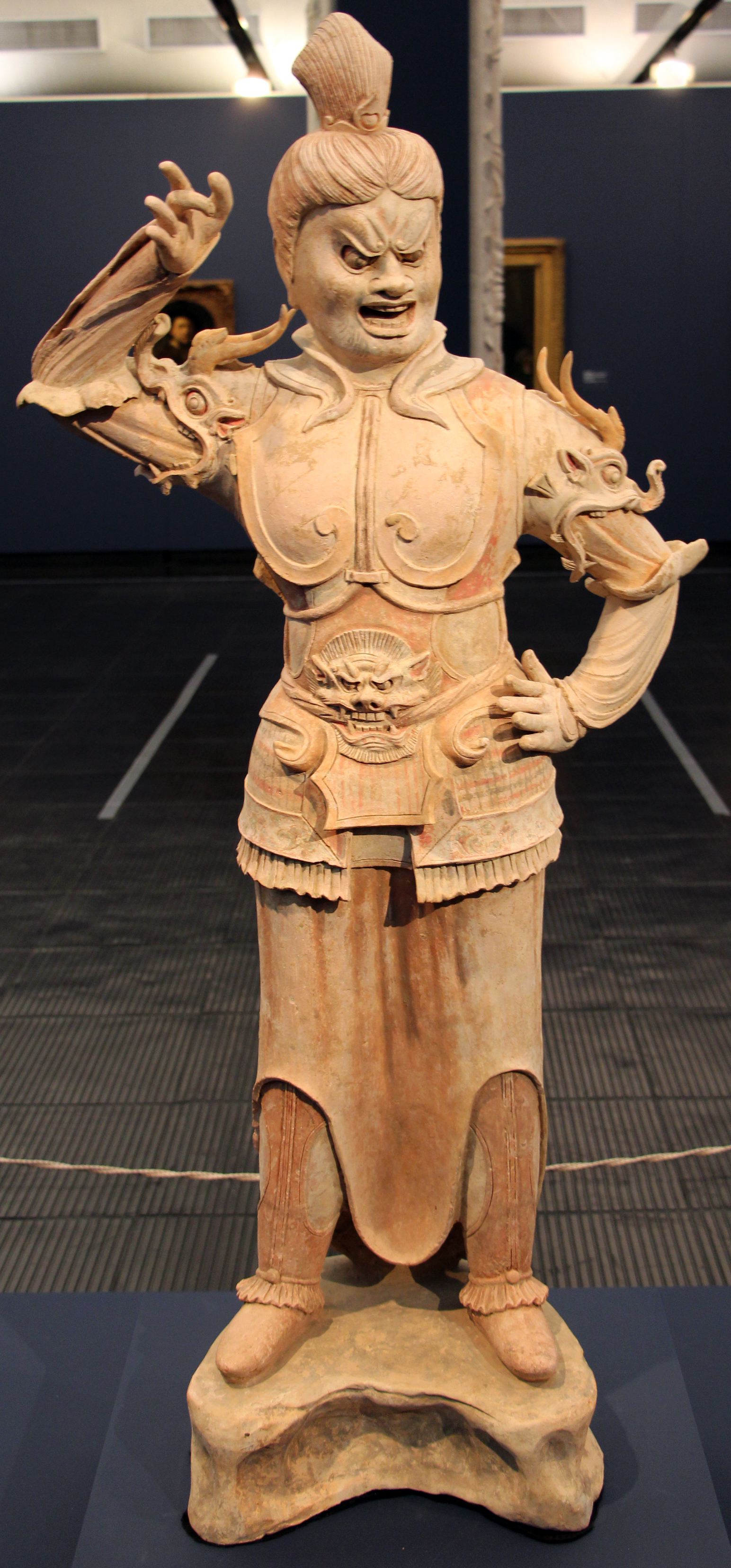 Museu de Arte de São Paulo